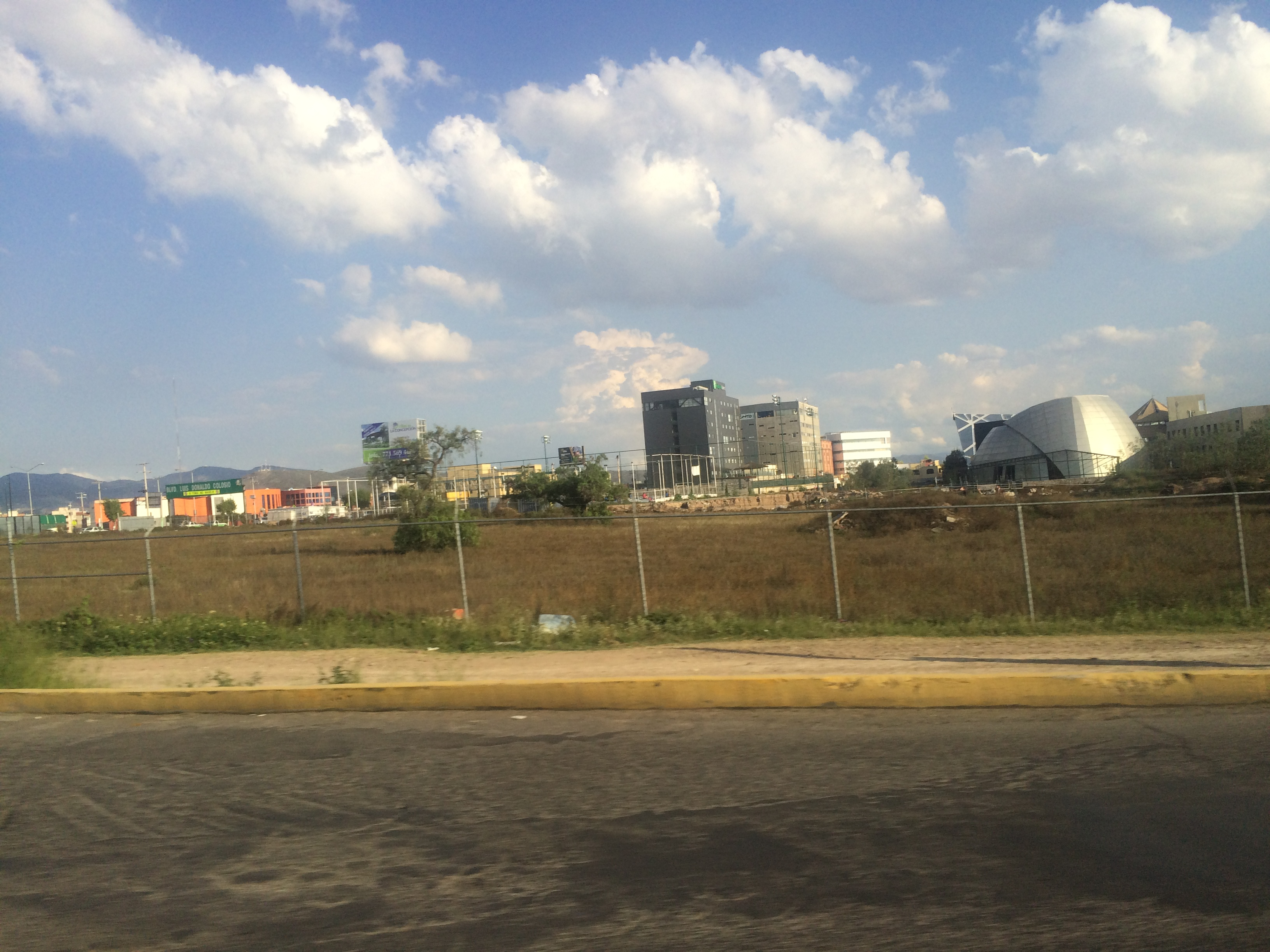 Vista lateral de escuela cedrus y hospital intermedica en Bvd. G Bonfil